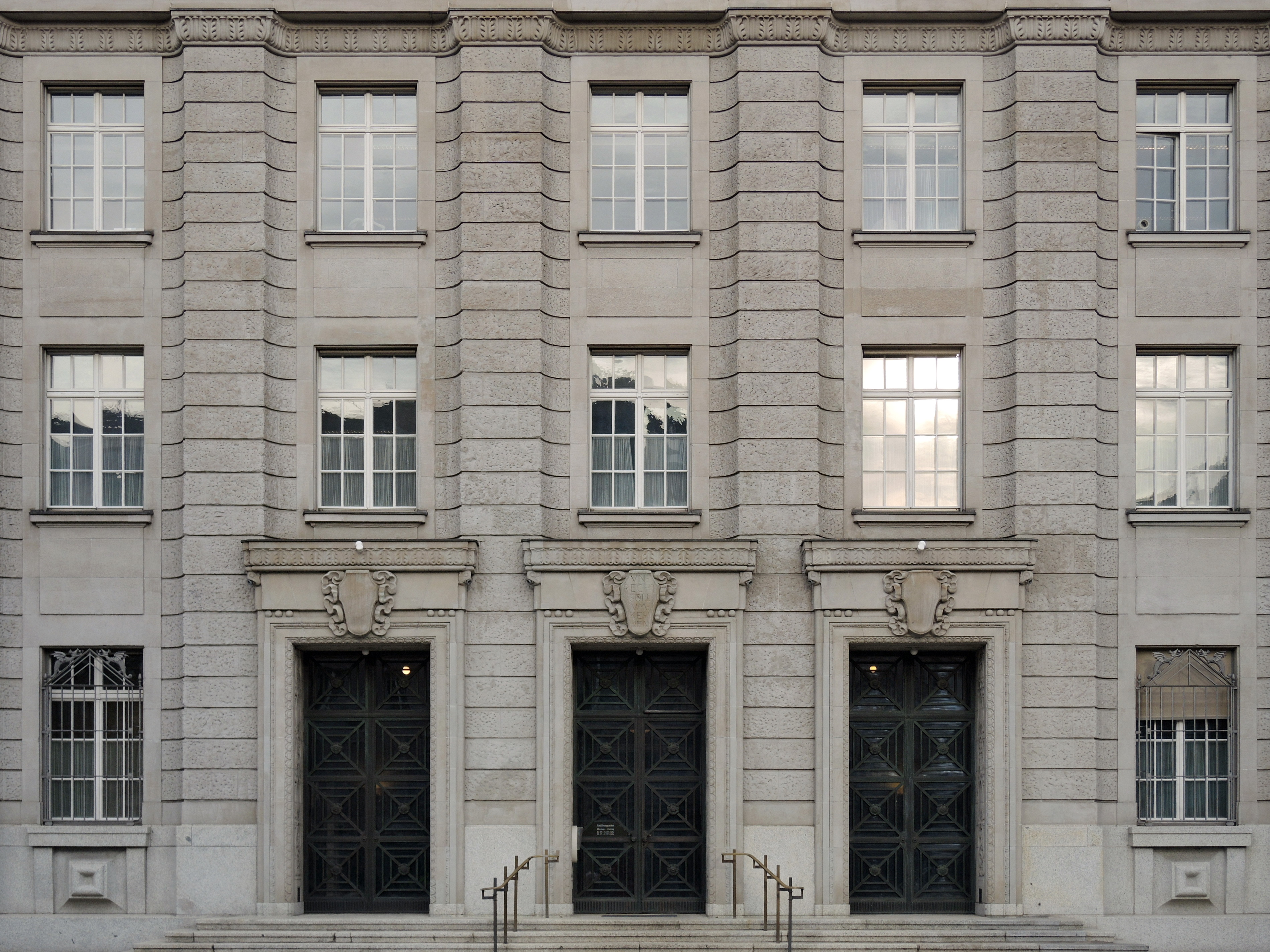 Bezirksgebäude in Zürich-Aussersihl (Switzerland)